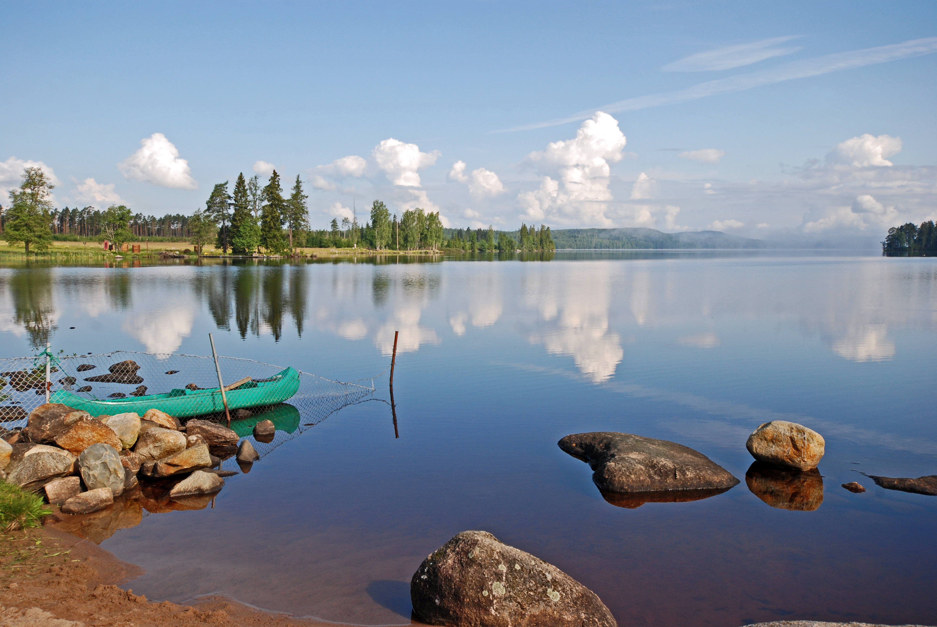 Lersjön i juli 2015, vy från södra stranden